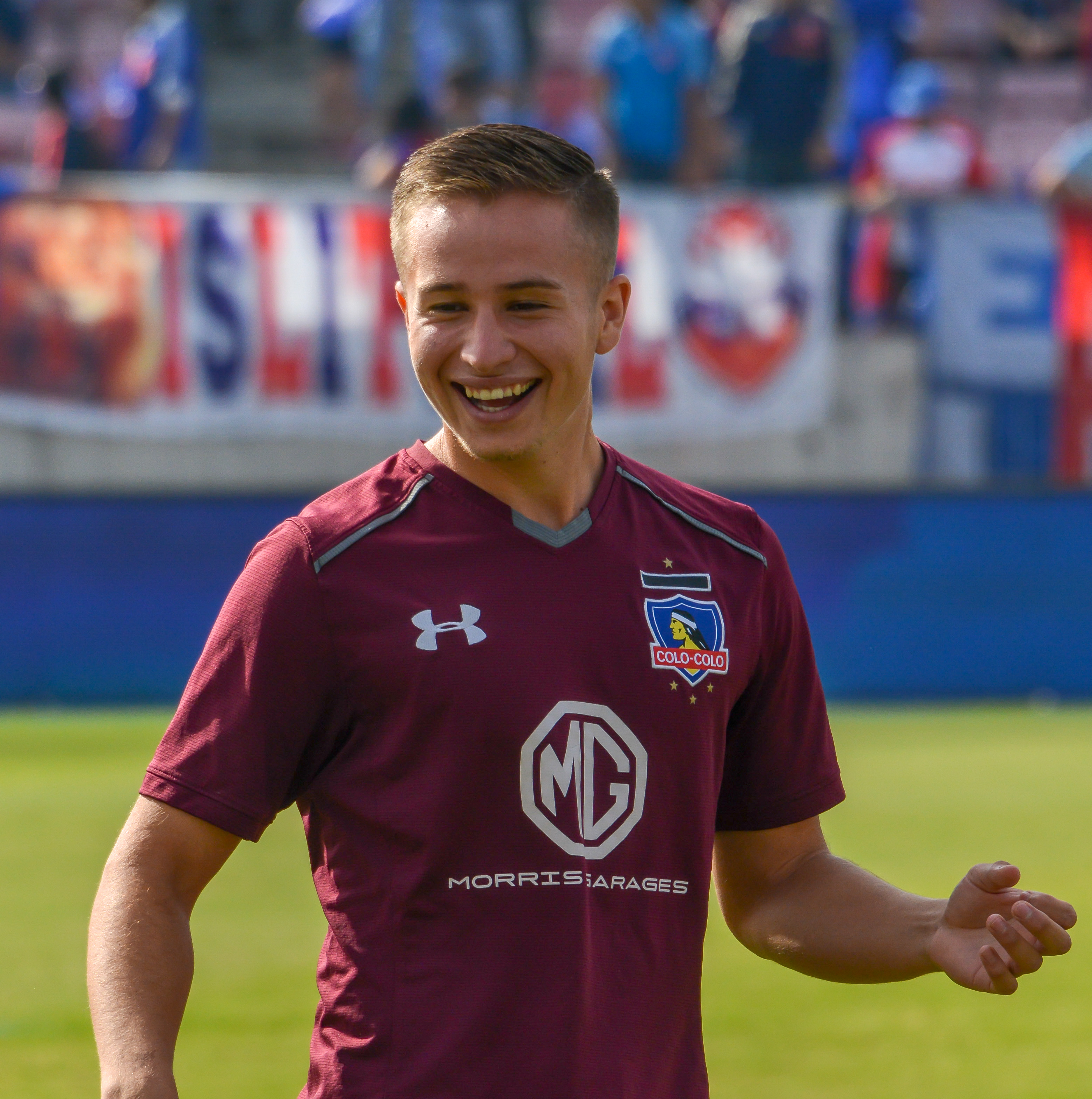 Benjamín Berríos, Universidad de Chile v Colo-Colo, Estadio Nacional, Santiago, Chile.